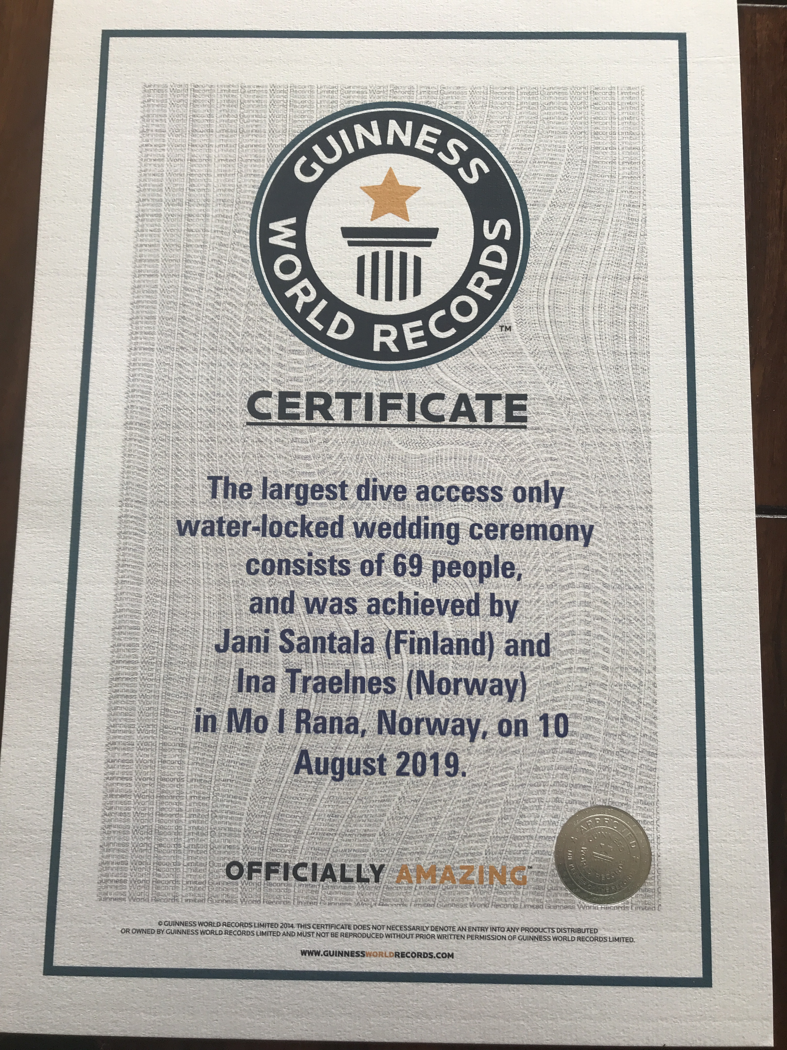 Guinness World Records Diploma, Largest wedding in waterfilled cave, Plura.